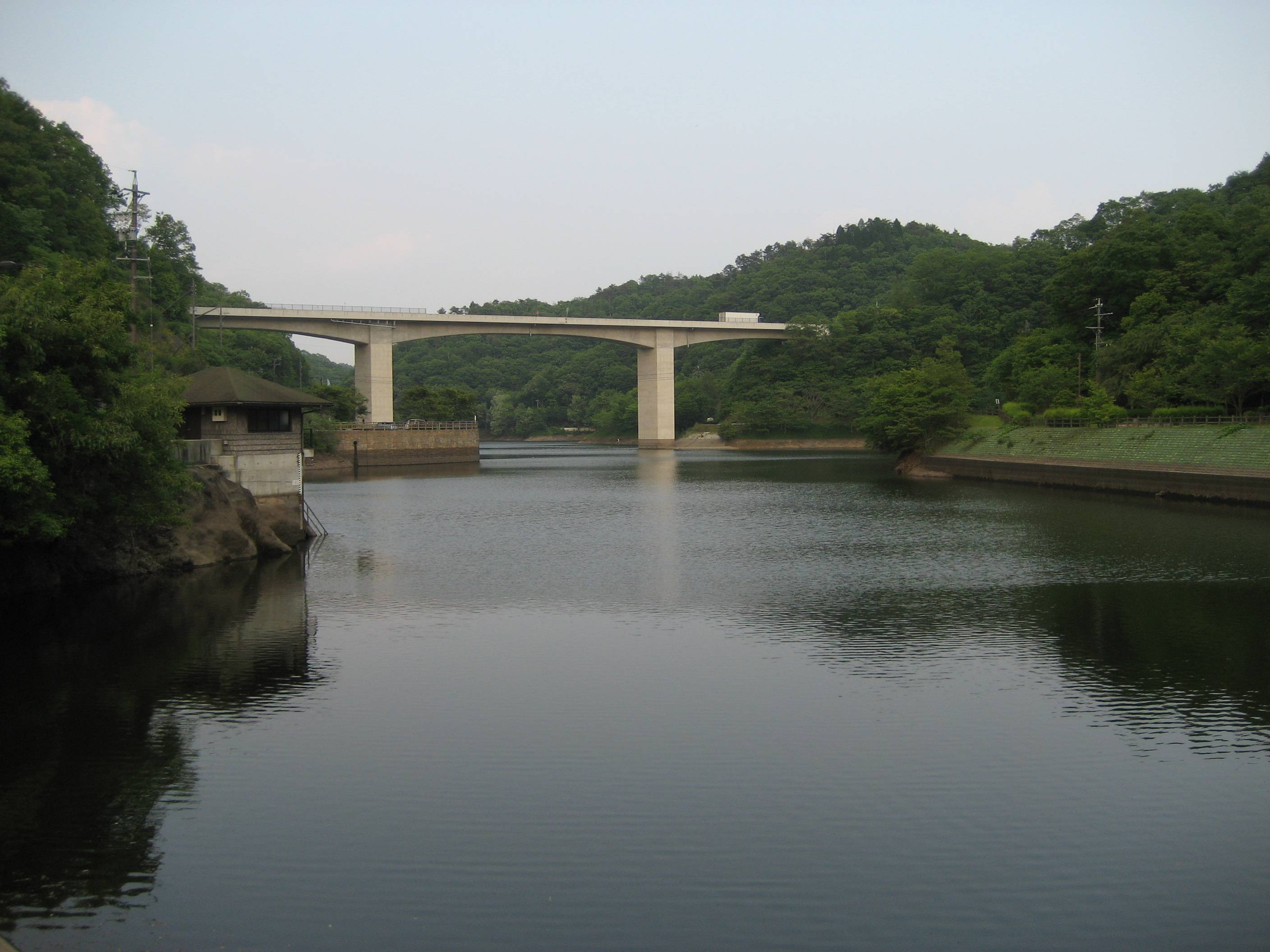 Kobuchi Dam (小渕ダム)